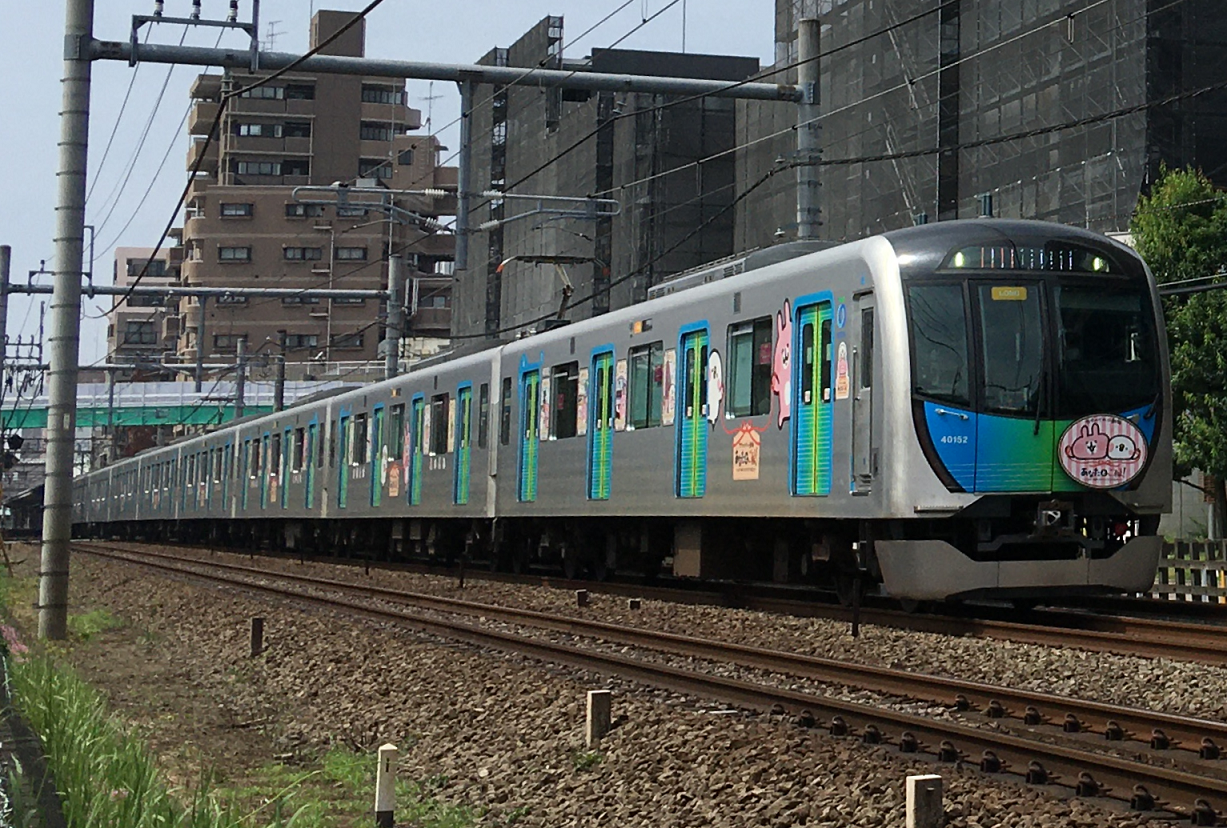 小平 - 久米川間